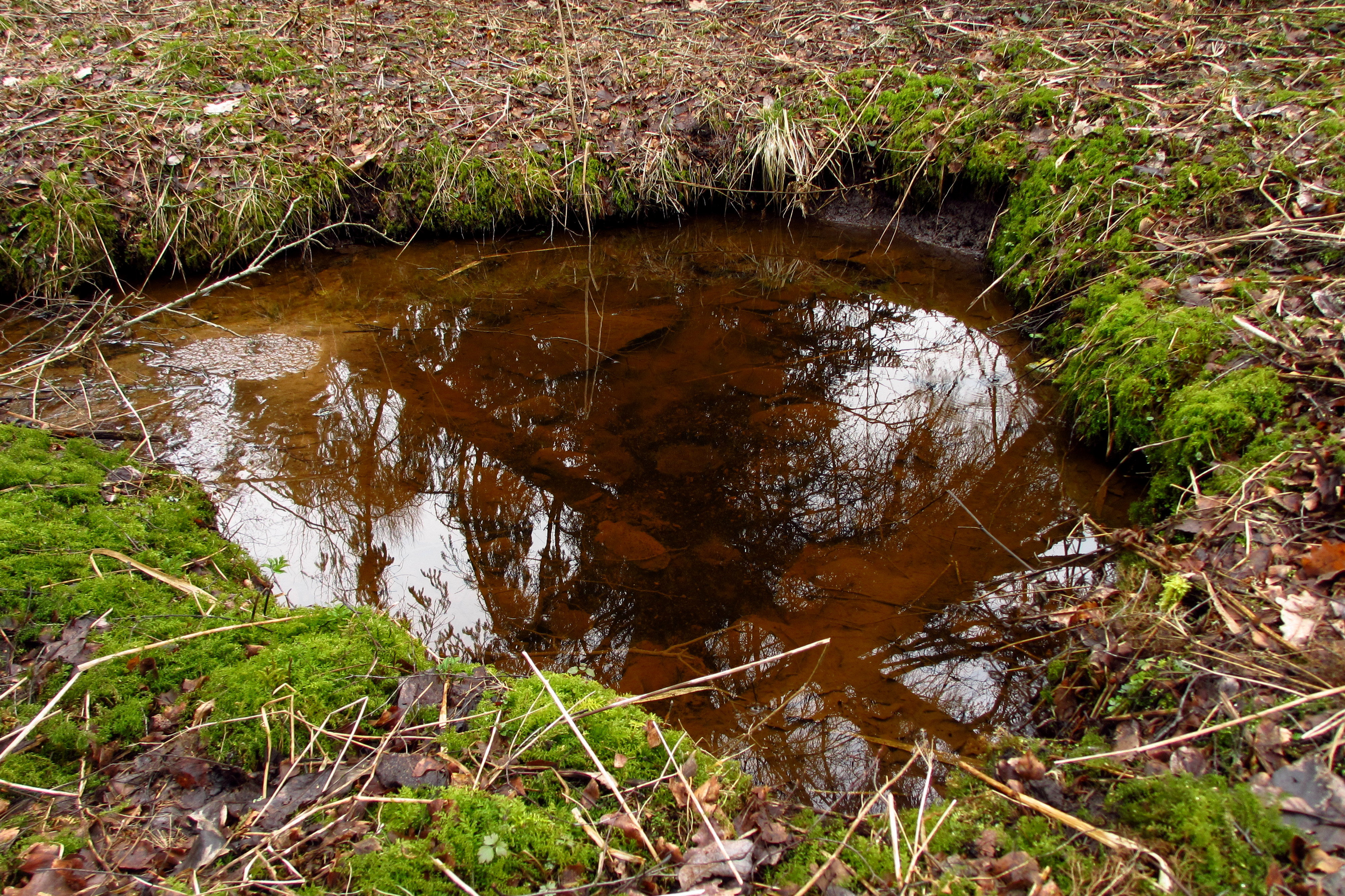 Tomingmäe allikad